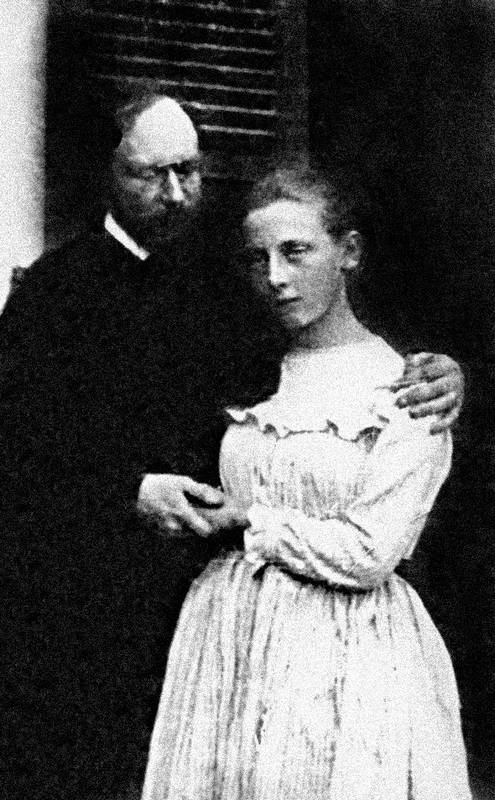 Вячеслав Иванов (1866 - 1949) и Вера Шварсалон (1890 - 1920)